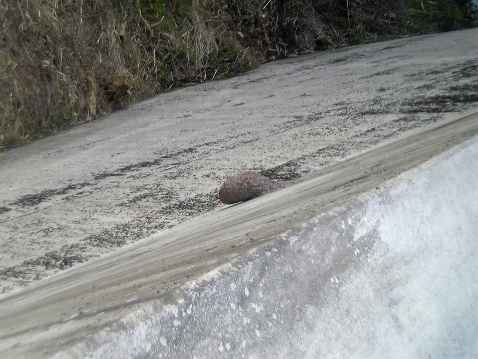 砂防ダムの壁面に作られたスズメバチの巣 （米原市上丹生）